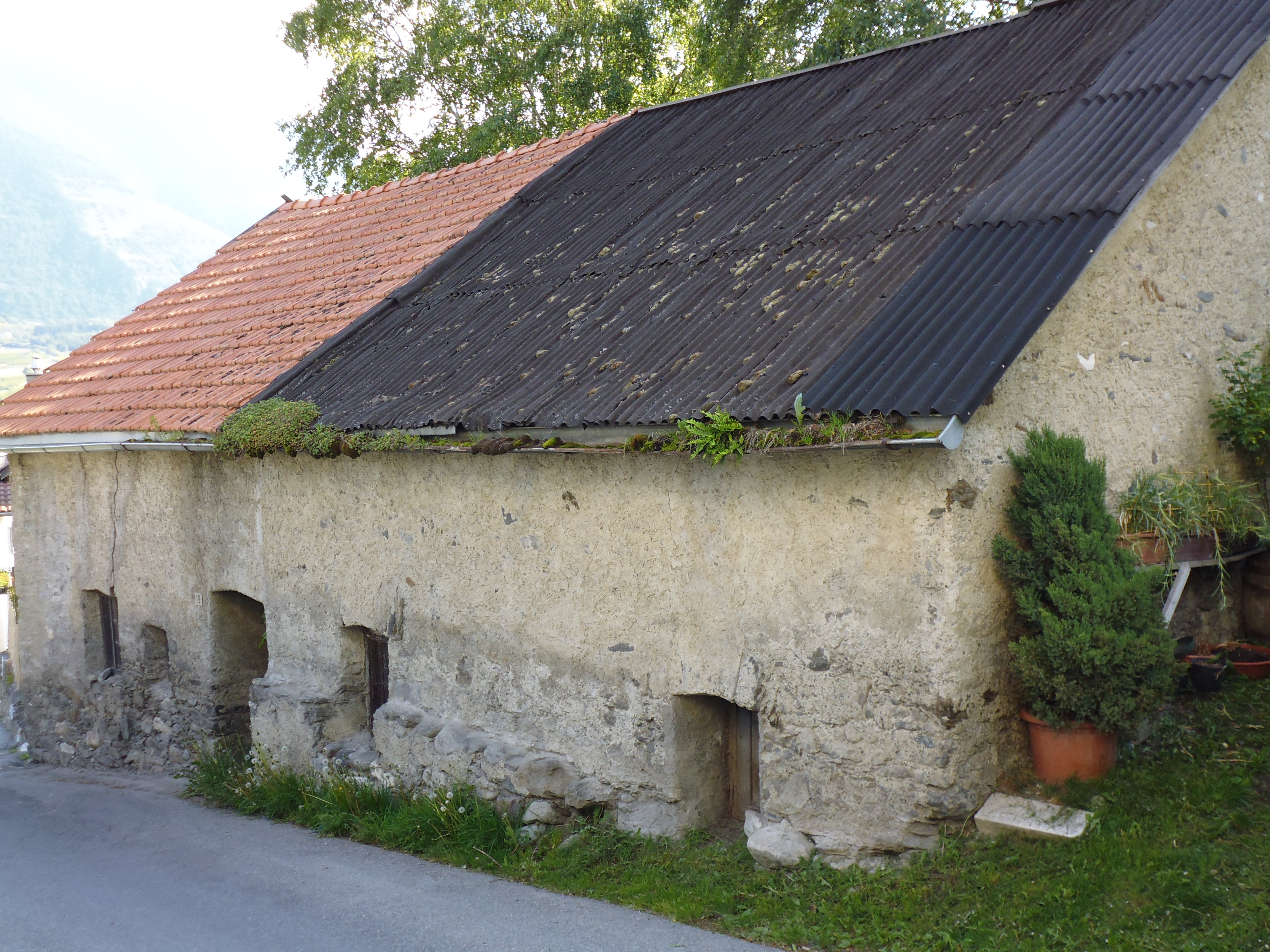 Haus in Laas